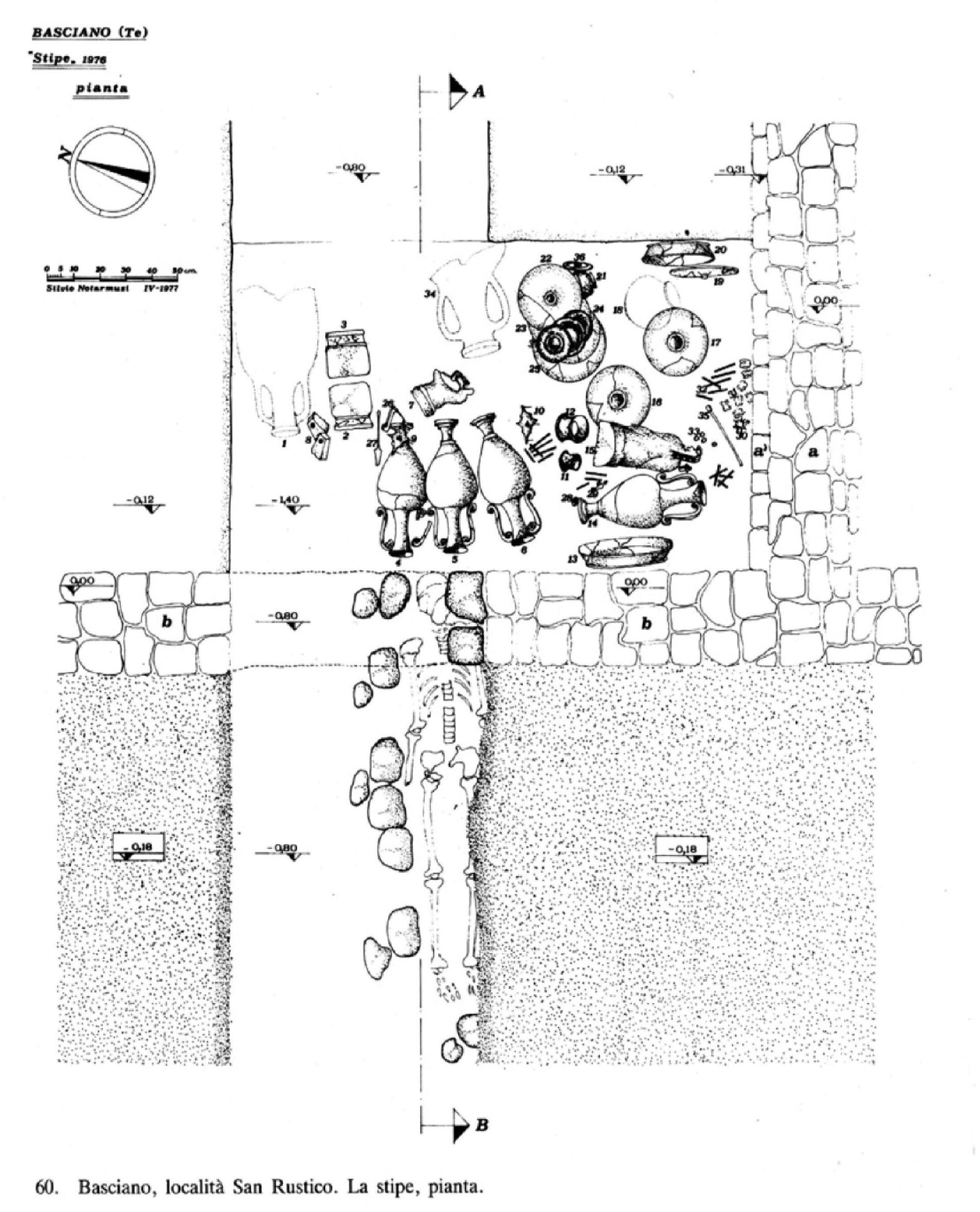 schizzo stipe votiva vicus san rustico